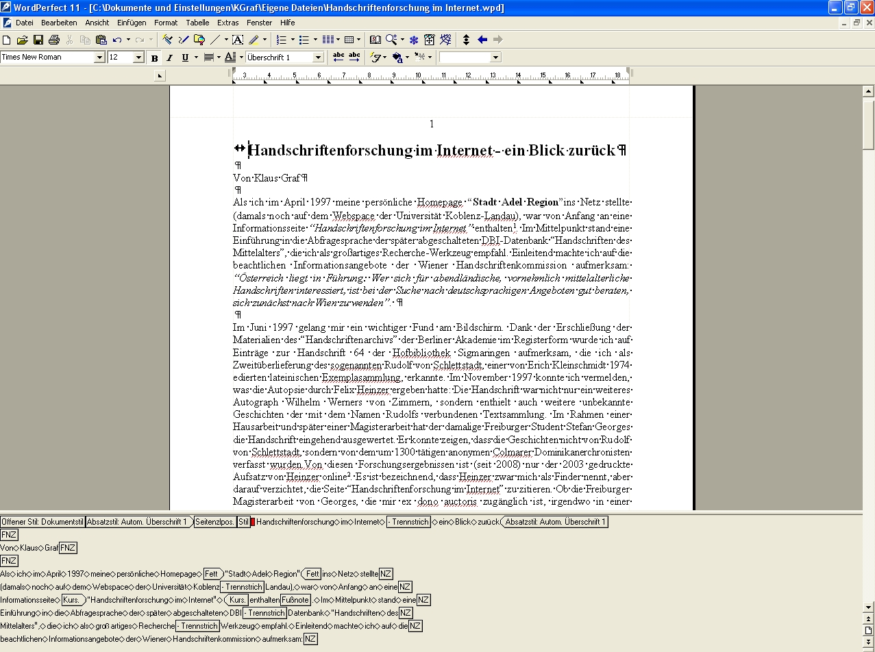 Text in Wordperfect 11 mit Steuerzeichendarstellung